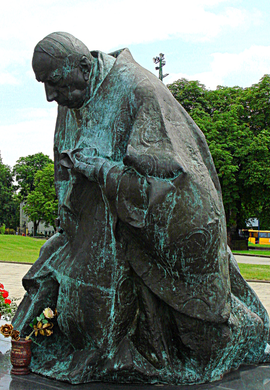 Częstochowa, Jasna Góra, pomnik kardynała Stefana Wyszyńskiego